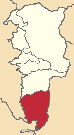 Mapa localizacor del cantón en Bolívar, Ecuador